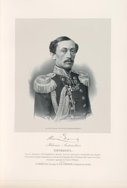 Контр-адмирал Н. А. Бирилёв